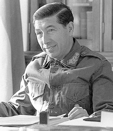 Marío Benjamín Menéndez, en 1975, cuando se encontraba al mando en el Operativo Independencia.